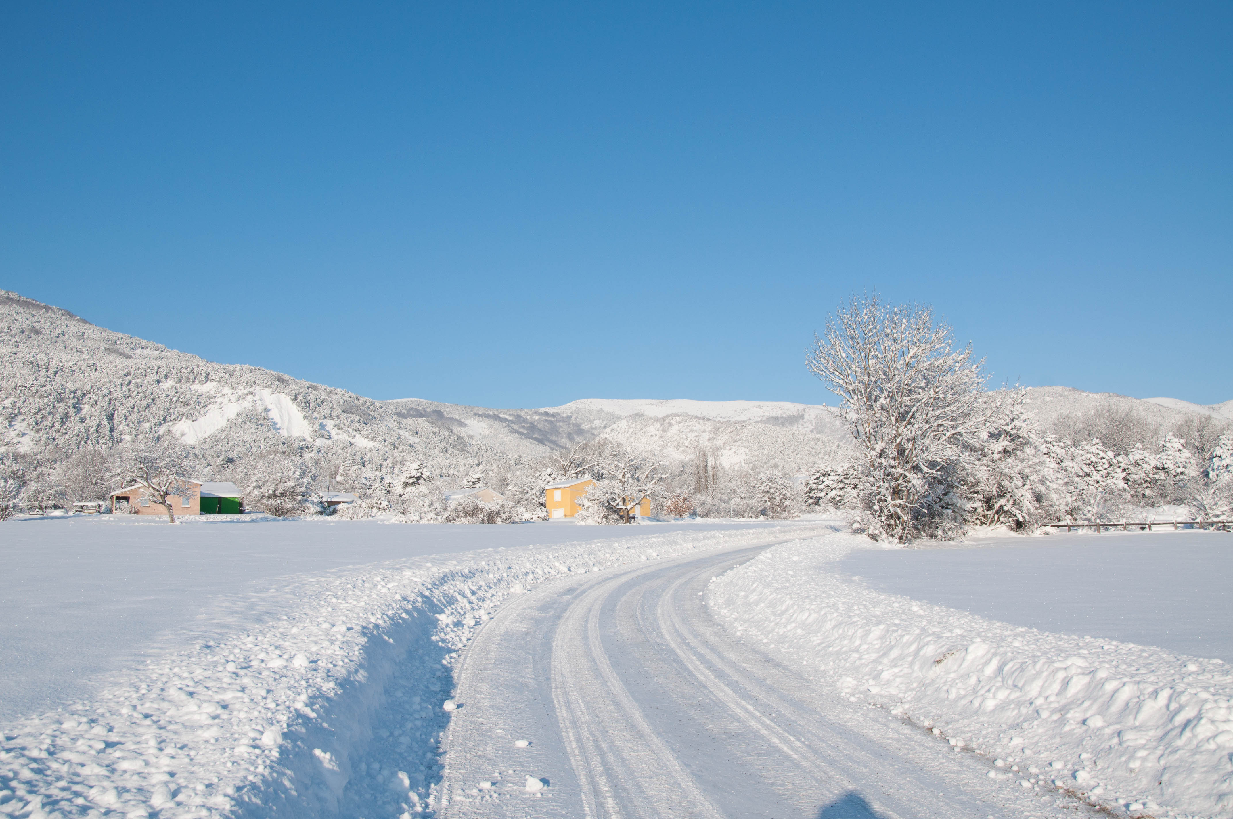 Neige à Clumanc